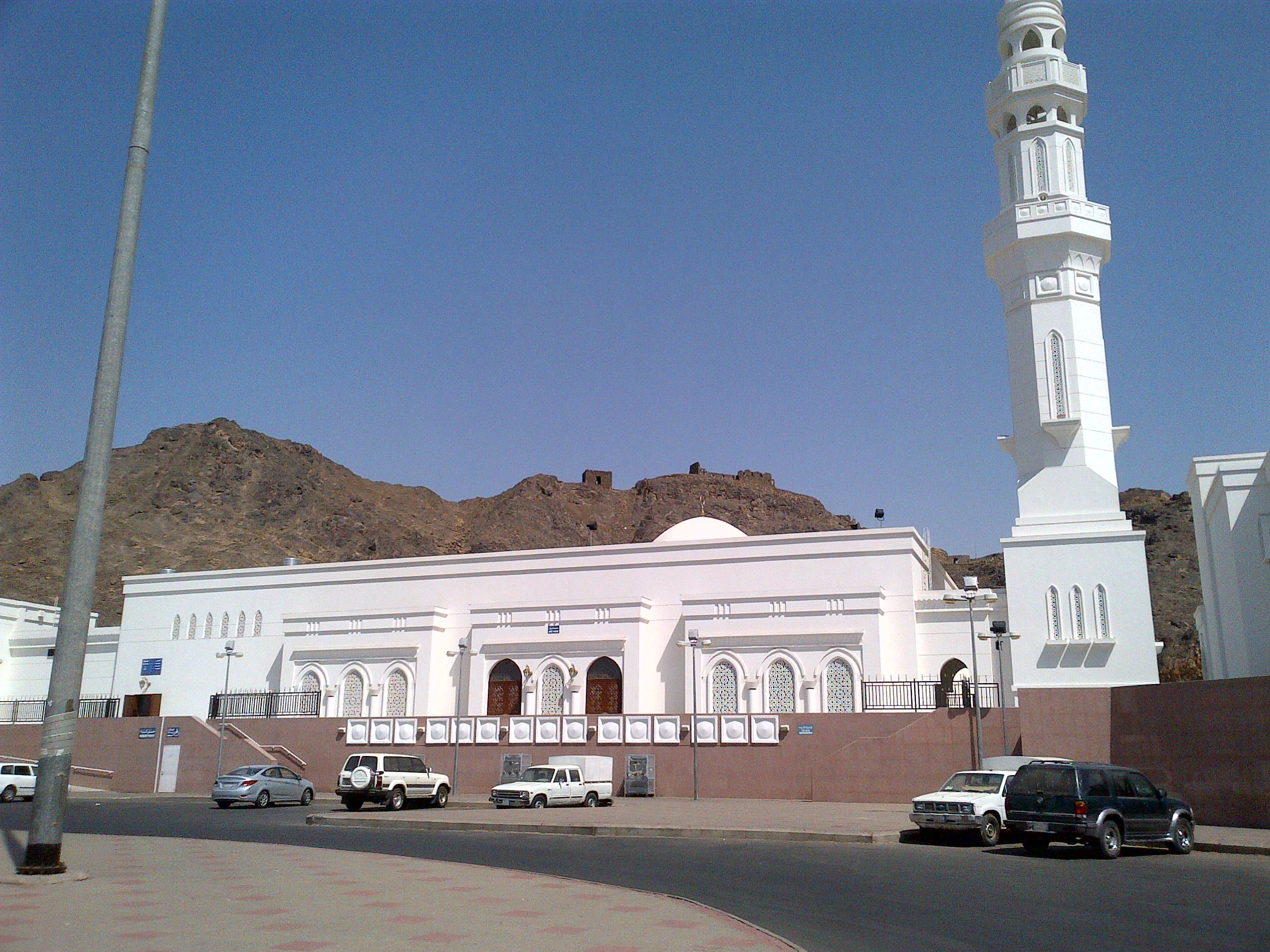 Tempat ini adalah tempat pertempuran Khandaq